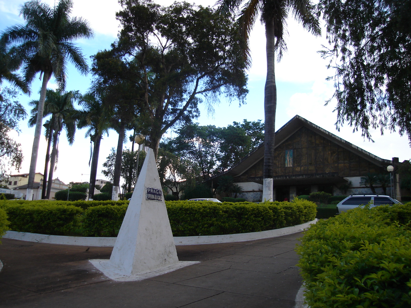 Vista da Igreja Matriz de Nossa Senhora de Lourdes, a partir da Praça em frente a mesma, em Vespasiano-MG